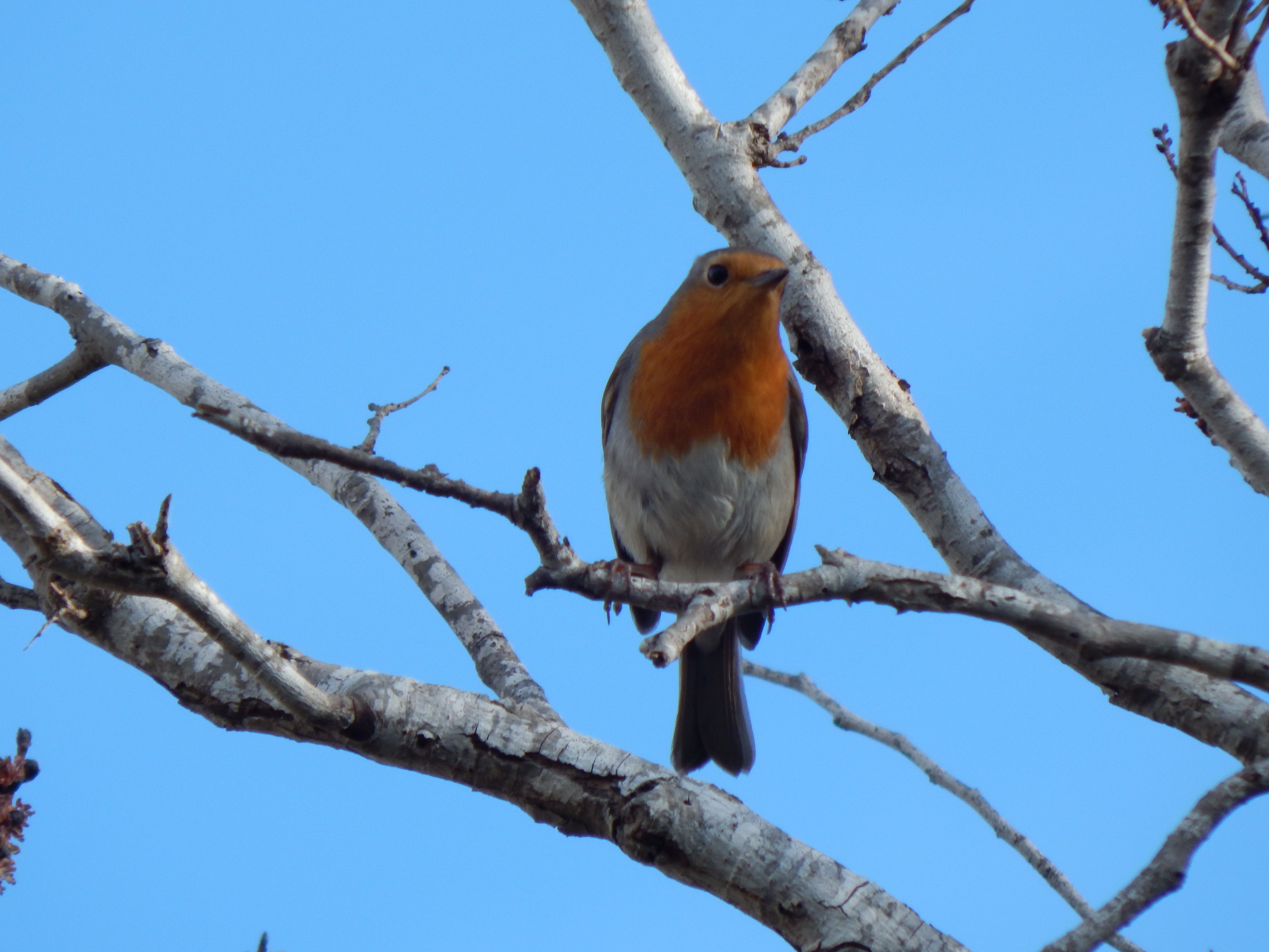 Pit-roig